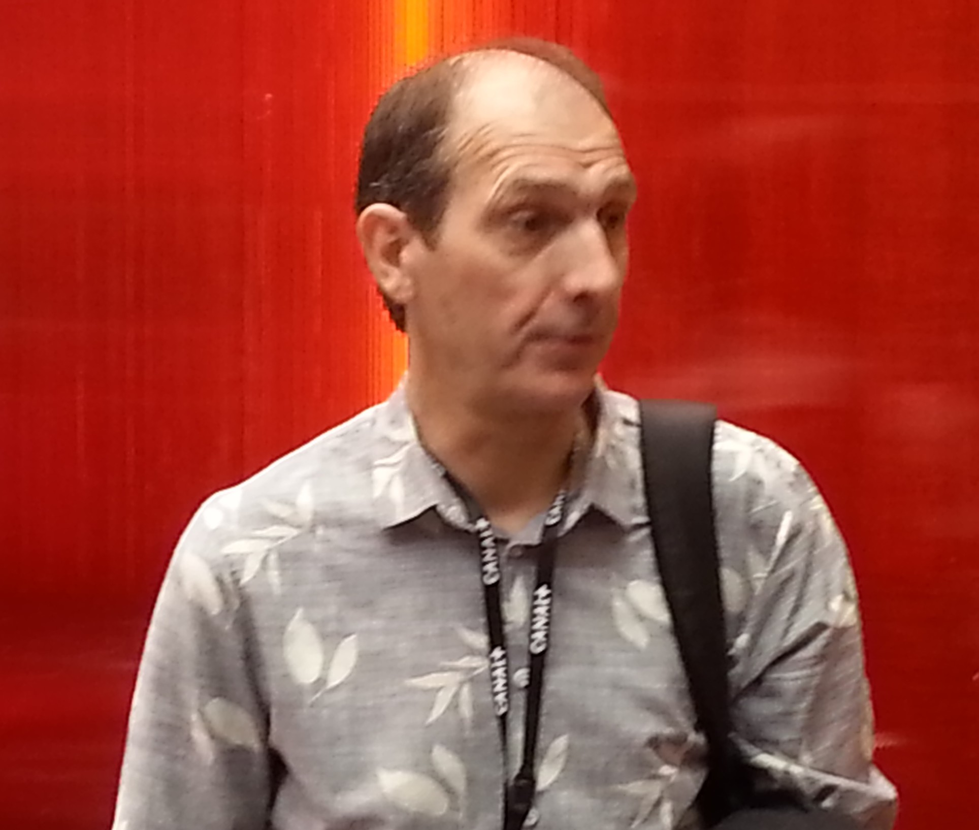 David Sproxton au festival international du film d'animation d'Annecy 2016